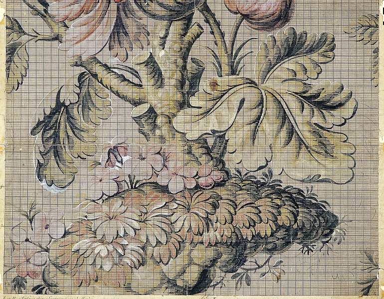 Mise en carte de Jean Revel. Musée des Tissus, Lyon Inv. no. 40932.